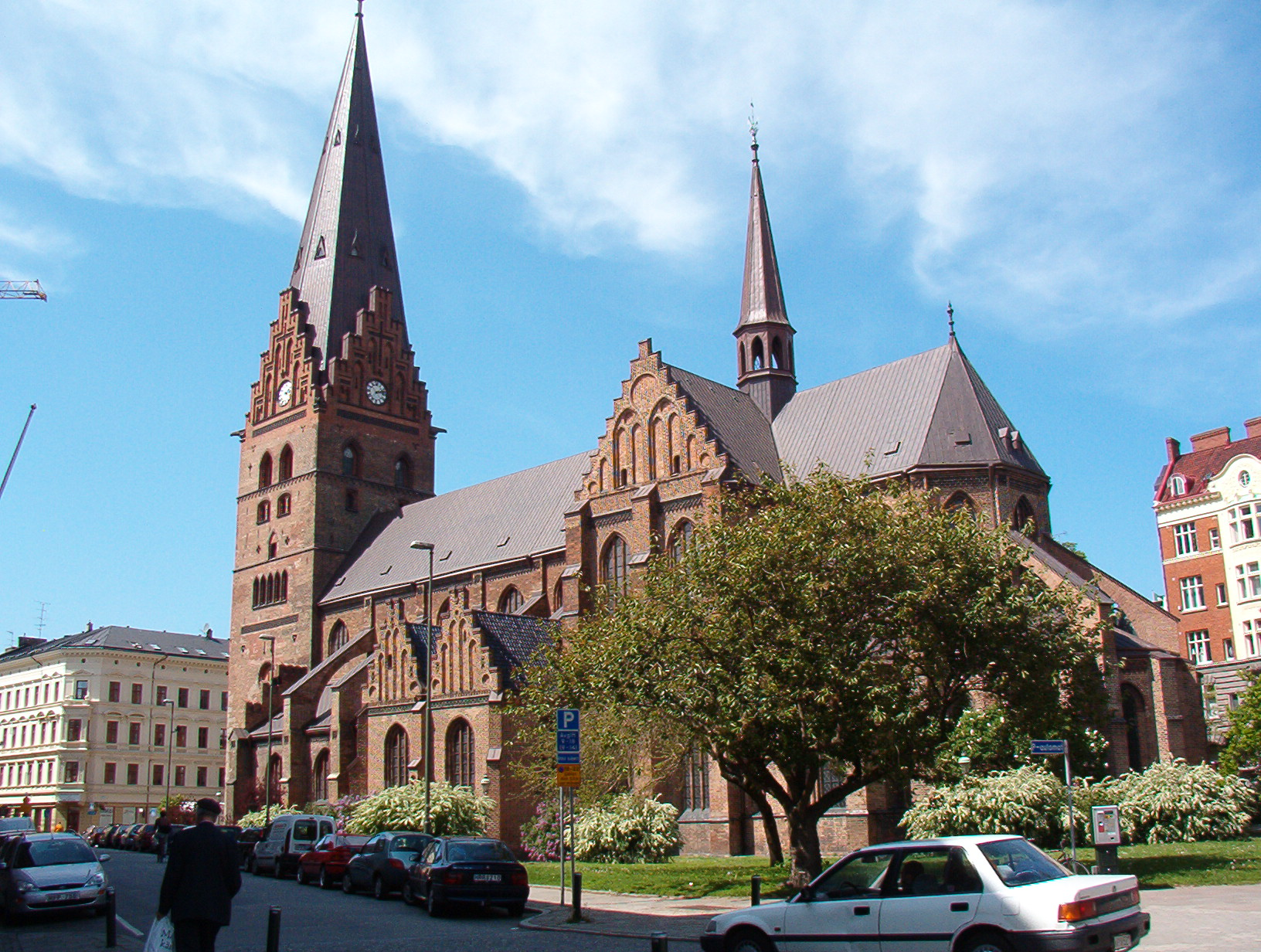 Date: May, 2003